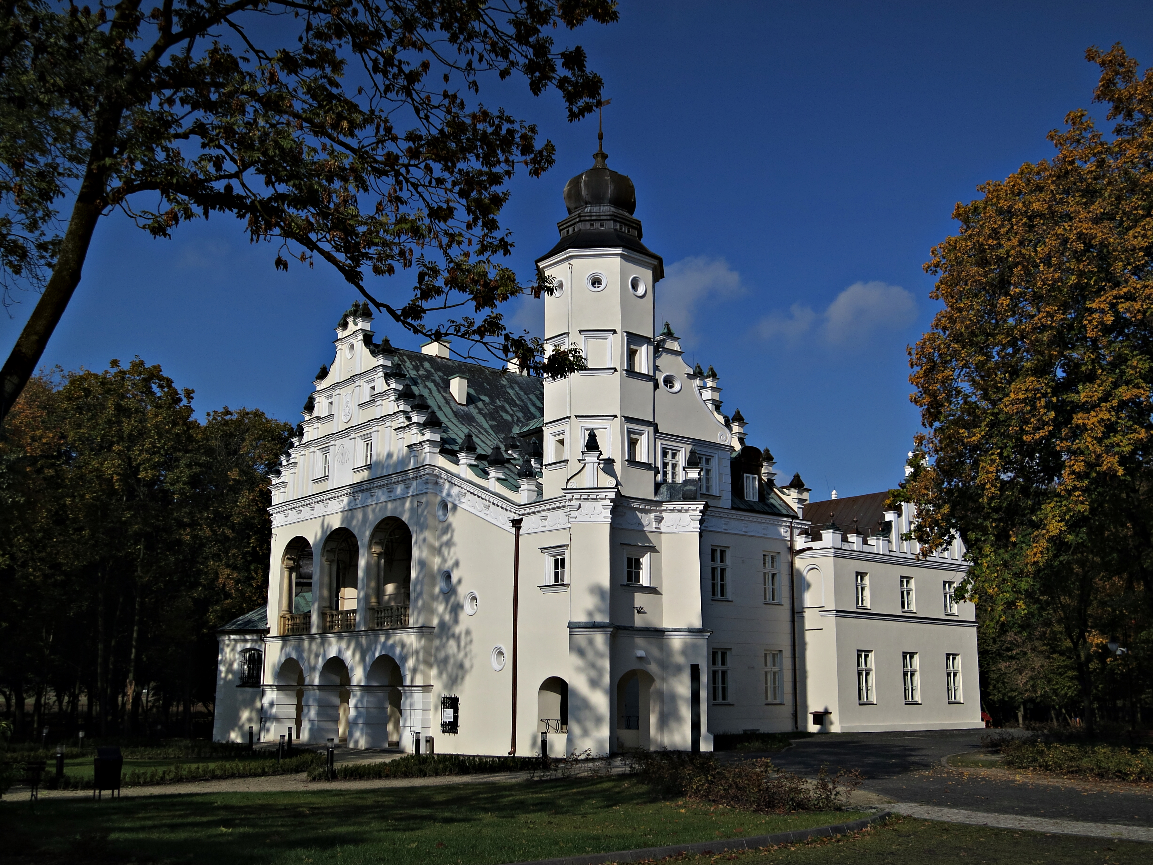 Poddębice, pałac (z kaplicą), 1617, 1832